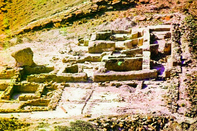 Kiran karvansarayı